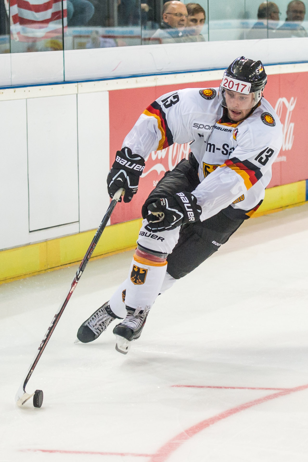 Tobias Rieder im WM-Vorbereitungsspiel gegen die USA in Nürnberg